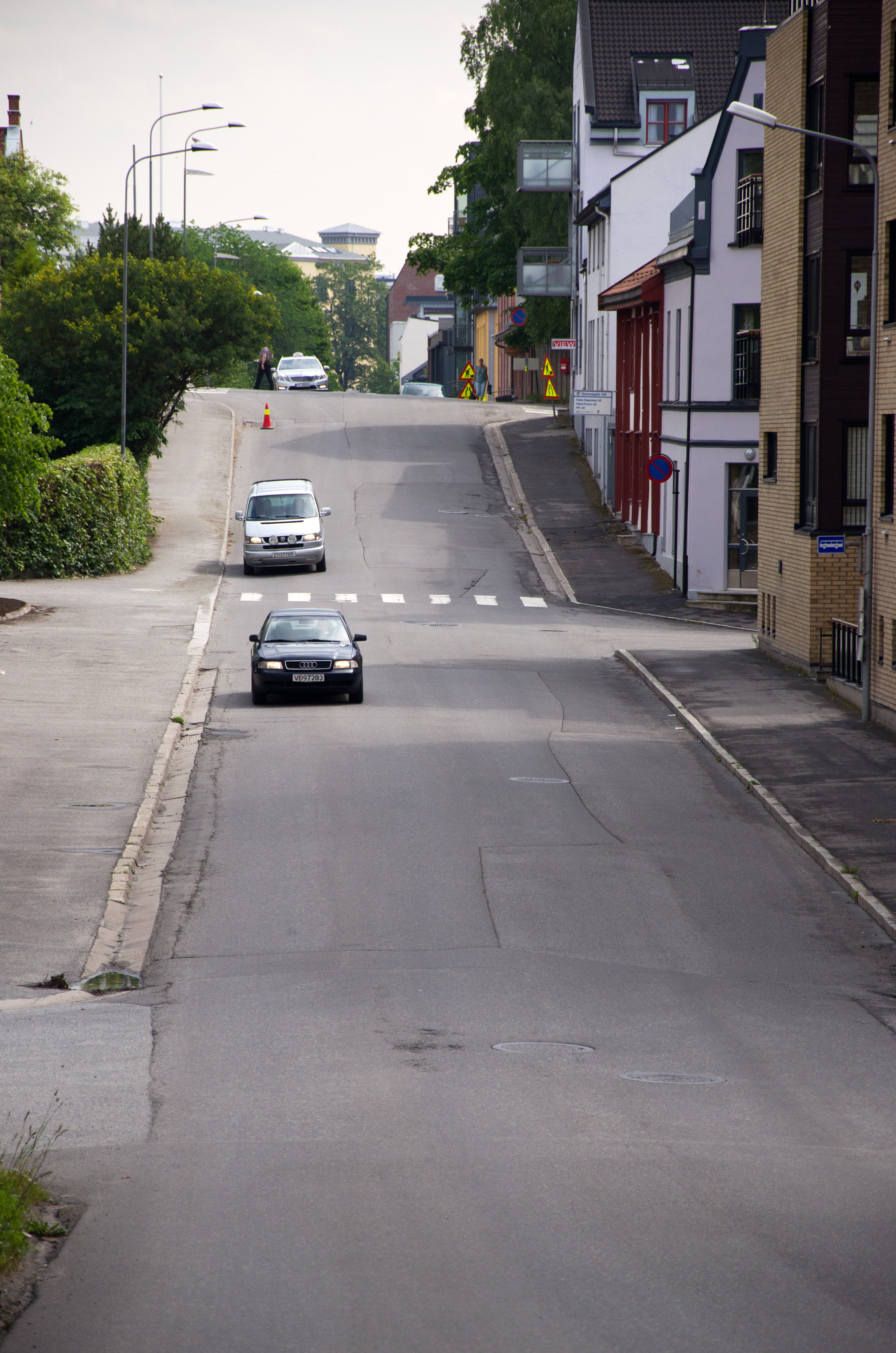 Fylkesvei 223 (tidl. 75), Grønnegata i Hamar